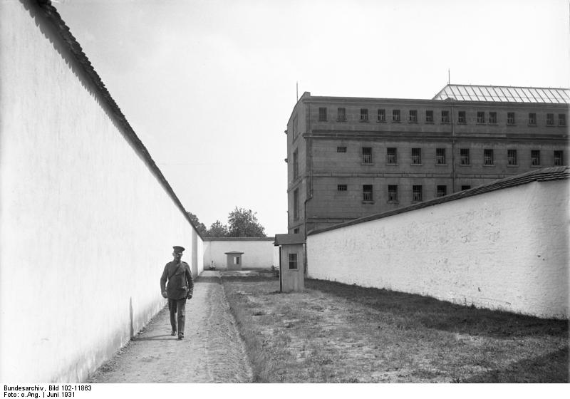 Das schwerste Zuchthaus Deutschlands, Zuchthaus Sonnenburg, die Strafanstalt für Schwerverbrecher. Zum ersten Mal hat der Präsident des Strafvollzugs-Amts gestattet, die schwerste Strafanstalt Deutschlands, das Zuchthaus Sonnenburg bei Küstrin zu photographieren. Ca. 400 Insassen verbüssen dort eine Strafe von insgesamt ungefähr 2500 Jahre. Die Behandlung der Schwerverbrecher wird nach den modernsten Grundsätzen der Zuchthausordnung ausgeführt. Die Gefangenen unterhalten eine eigene Druckerei, Tischlerei, Bäckerei usw. Nach Verbüssung einer gewissen Zeit werden die Strafgefangenen bei guter Führung auch mit Aussenarbeit beschäftigt. Blick in den Gang der über 4 m hohen Doppelmauern, welche sich um das ganze Zuchthaus ziehen. Tag und Nacht patrouillieren Beamte zwischen den Mauern. Im Hintergrund das Hauptgebäude des Zuchthauses mit den Zellen der Lebenslänglichen.